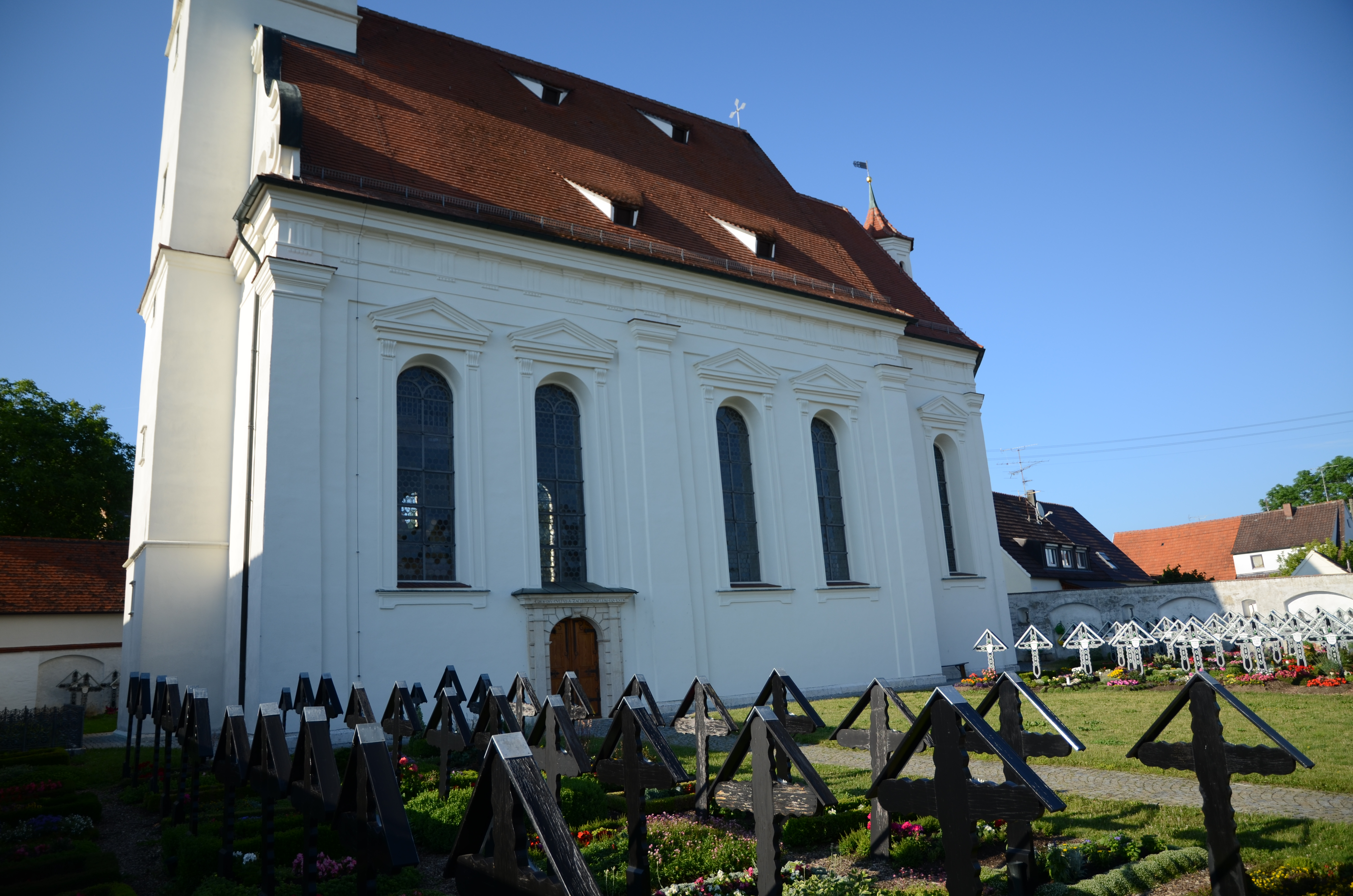 evang.-luth. Dreifaltigkeitskirche in Haunsheim